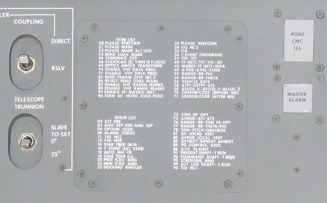 Liste der Befehle im Apollo Guidance Computer. Zur schnellen Verfügbarkeit war sie auf eine Instrumentenbrettverkleidung gedruckt. List of numeric codes for verbs and nouns in the Apollo Guidance Computer. For quick reference, they were printed on a side panel.